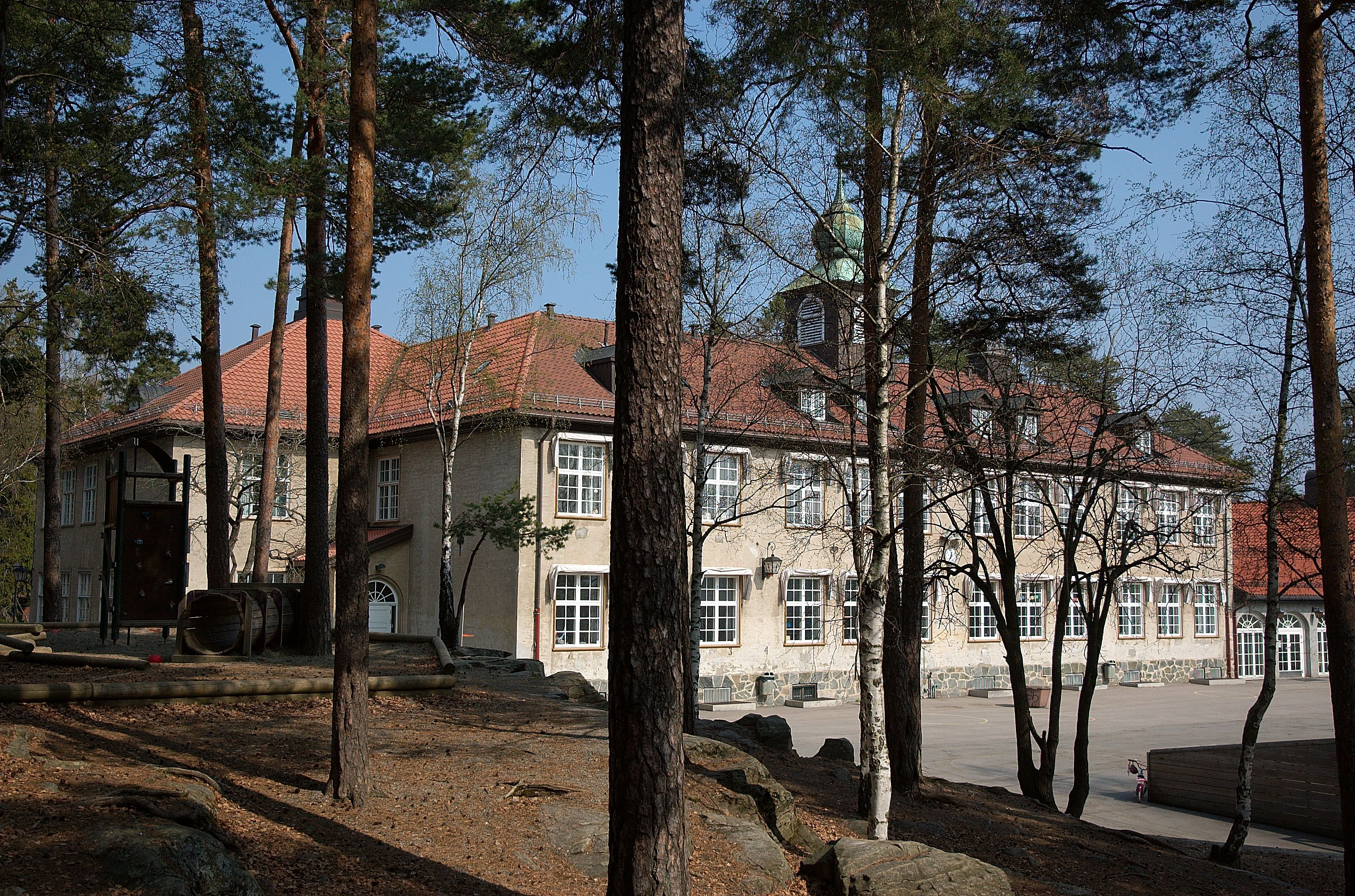 Ljan skole fra 1923. Arkitekter var Christian Morgenstierne og Arne Eide